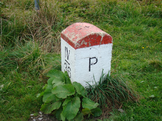 Patník nedaleko Špindlerovy boudy z polské strany.